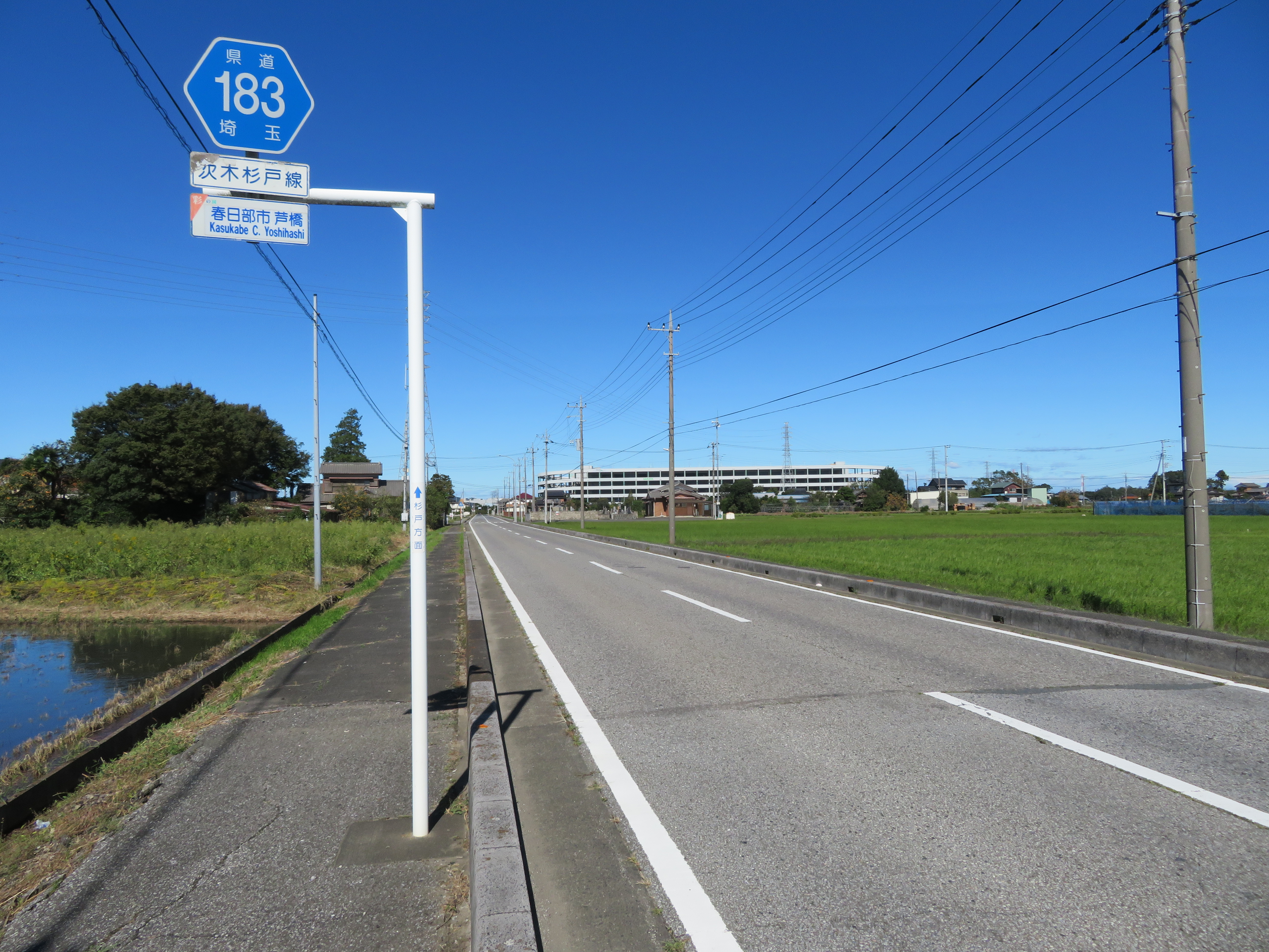 埼玉県道183号線 春日部市芦橋付近（杉戸方面を撮影）